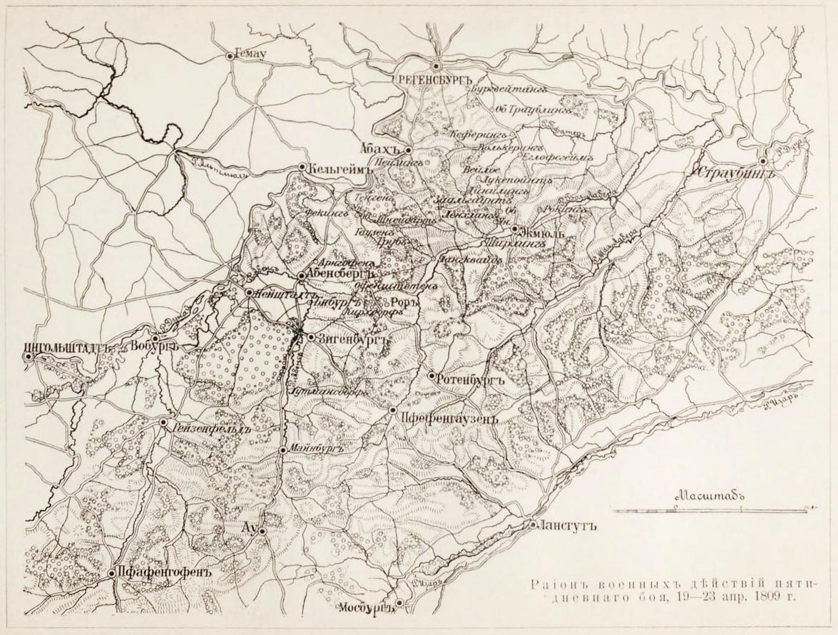 Изображение из «Военной энциклопедии» изданной книгоиздательским товариществом Ивана Дмитриевича Сытина. Санкт-Петербург; 1911—1915 гг. Фото к статье «Австро-французская война 1809 года». Район военных действий пятидневного боя 19-23 апреля 1809 года.